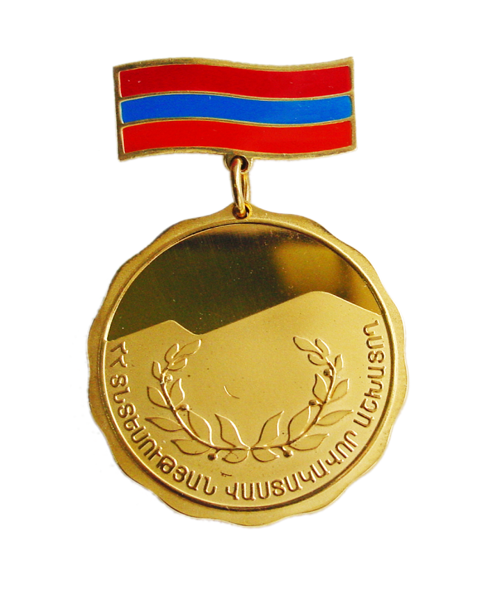 Հայաստանի Հանրապետության տնտեսության վաստակավոր աշխատող